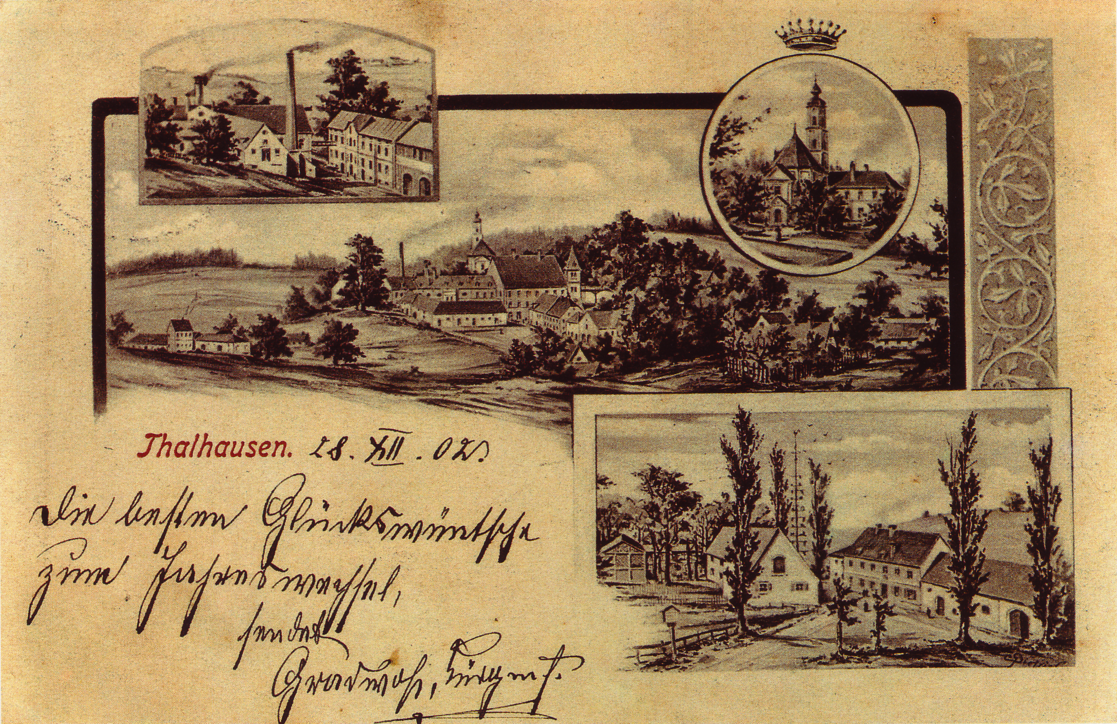 Postkarte von Thalhausen, Photograph unbekannt, gelaufen am 28.12.1902